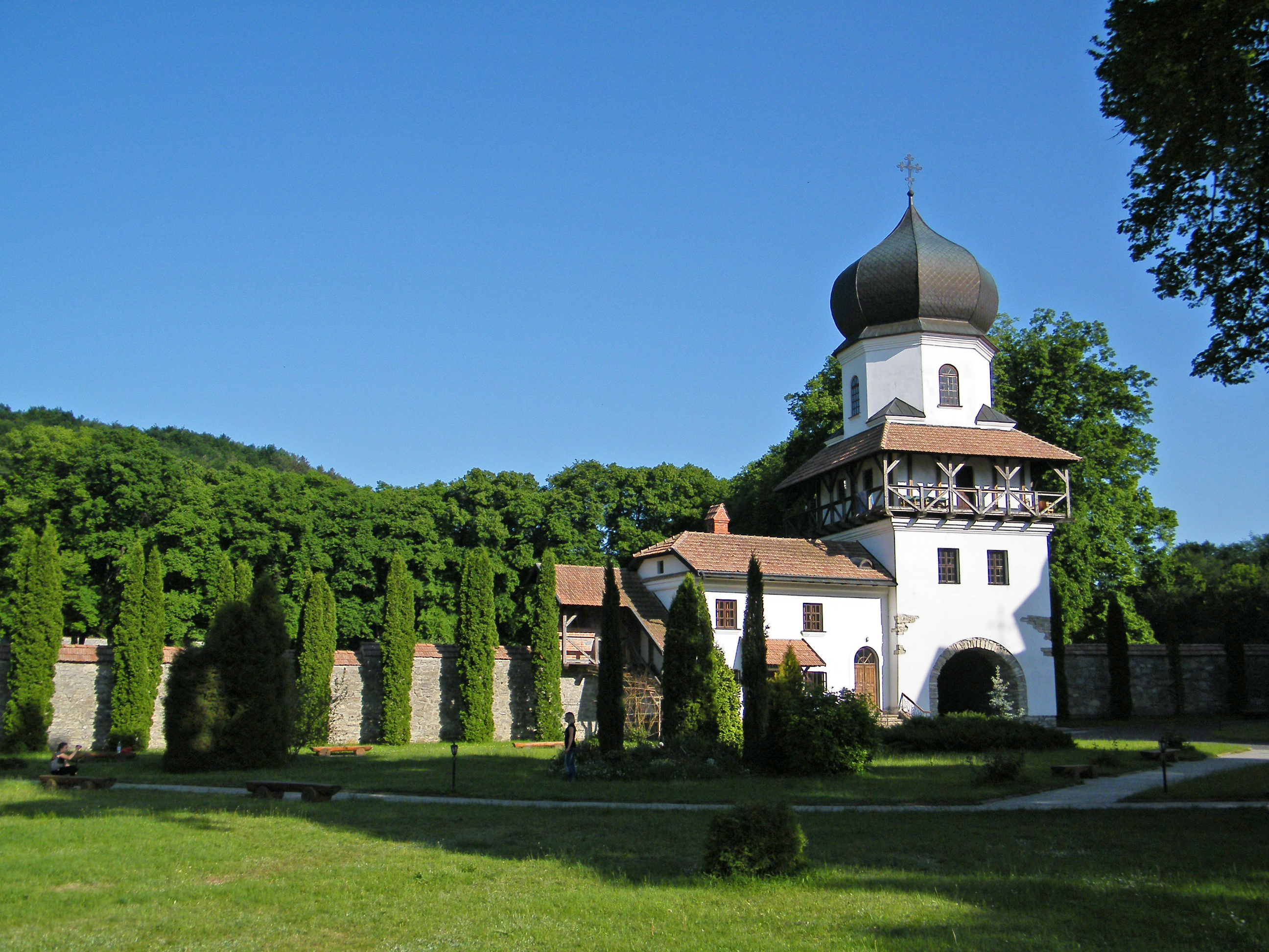 Двухъярусная башня колокольня